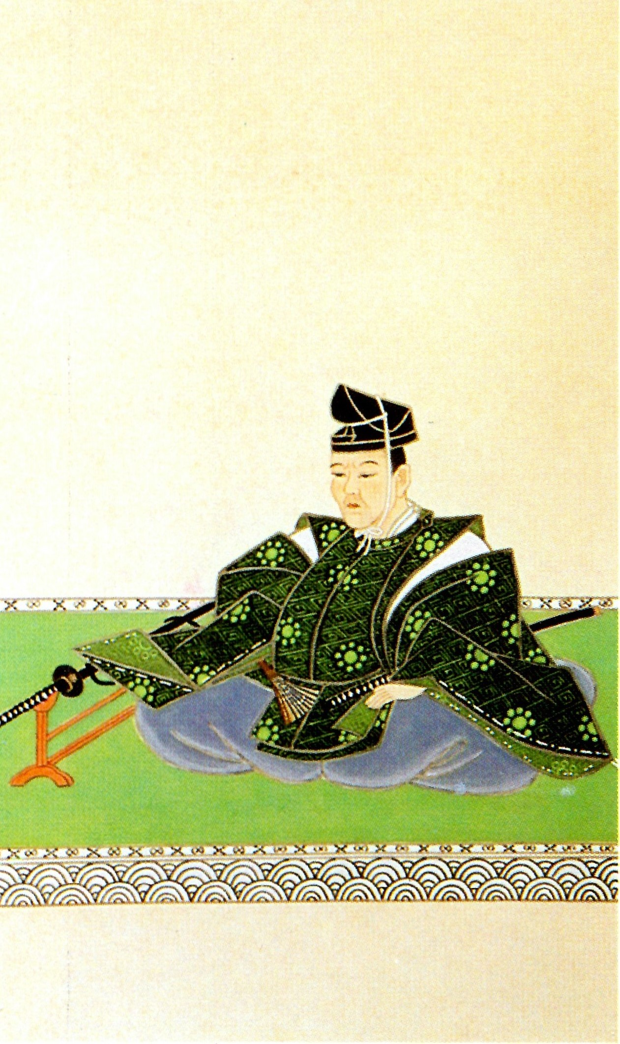 戸田氏長の肖像。